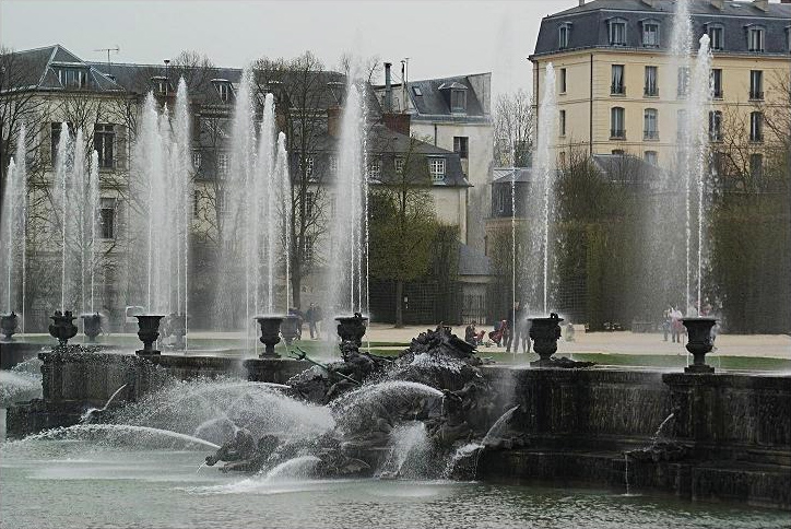 Grandes-Eaux d'avril 2009 - Bassin de Neptune - Petit Parc du Château de Versailles. En arrière plan on aperçoit l'hôtel du Garde-Meuble et à droite l'hôtel des Réservoirs Removed watermark: Jérémy Flavien Hubert